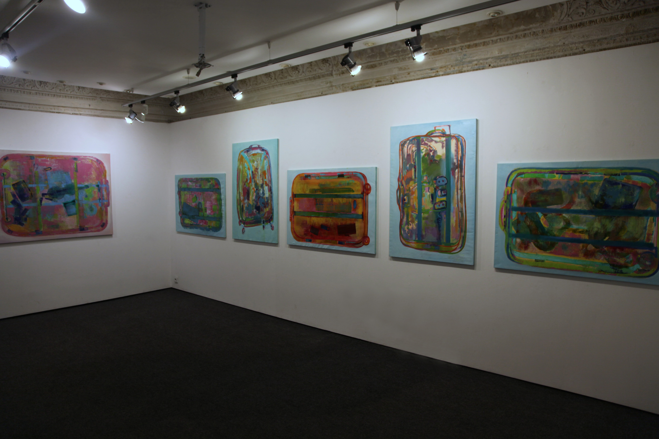 Карась Галерея. Тая Галаган (Гершуні) "Багаж". 2016